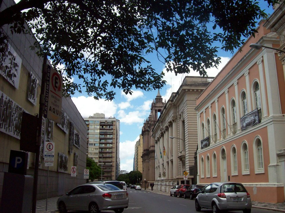 Conjunto Urbano-Paisagístico voltado para a Praça da Alfândega e Conjunto Histórico nas imediações da Praça da Matriz